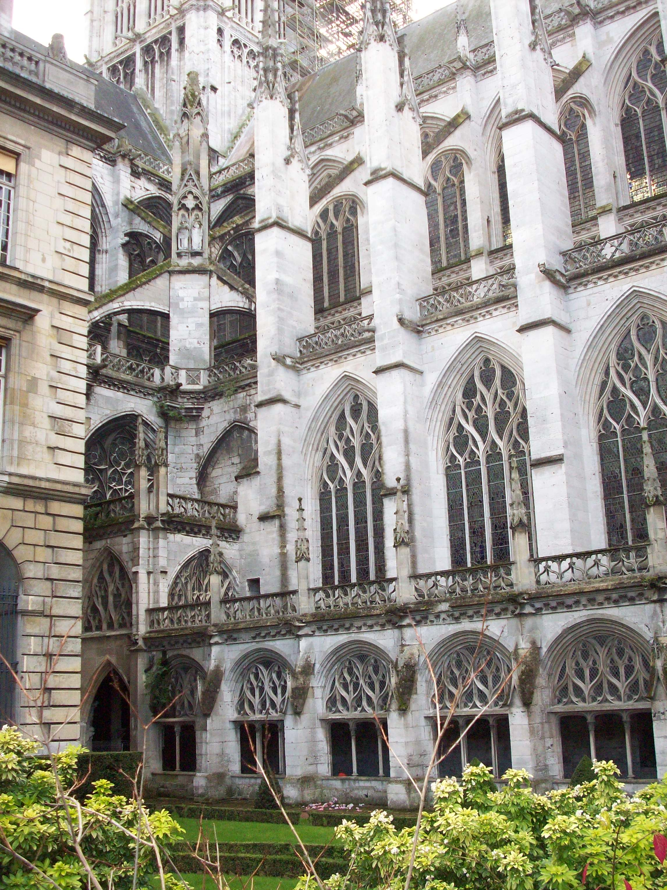 Détail de l'abbatiale Saint-Ouen.